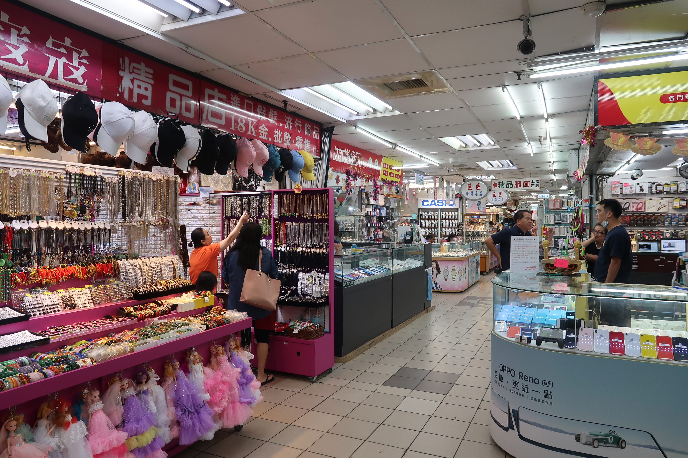 ASEAN Square Level 1